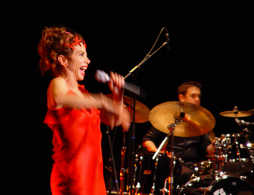 la digne fille de la movida madrileña !